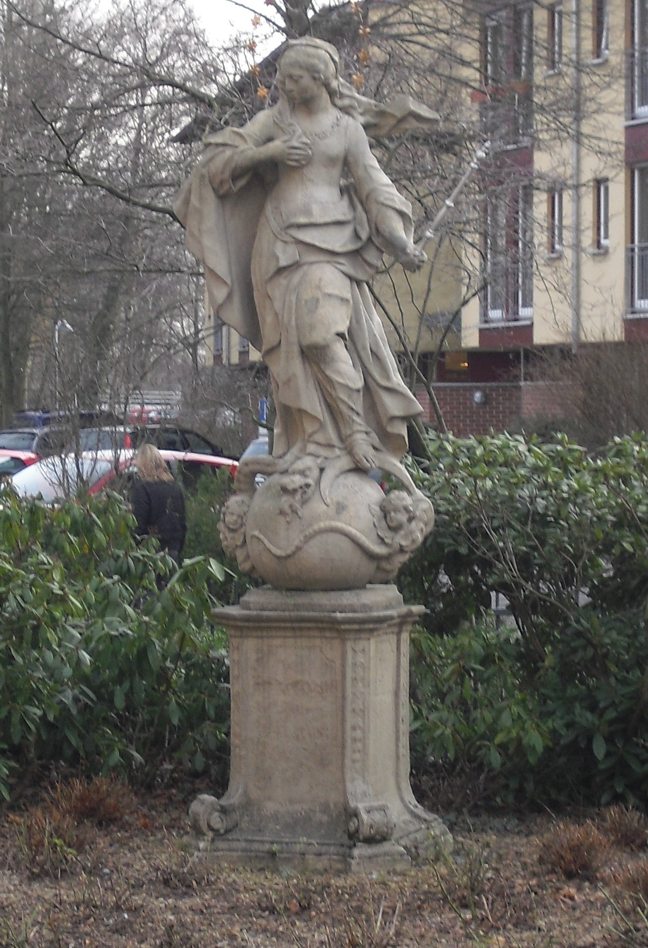 Maria Immaculata Statue an der Klosterkirche in Rietberg This is the photograph of an architectural monument. It is part of the list of cultural monuments of Rietberg, no. 62